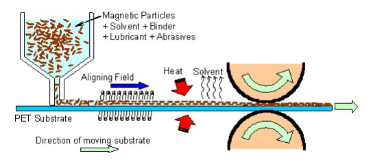 The processing route for particulate magnetic tape